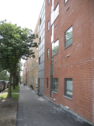 Dania v3